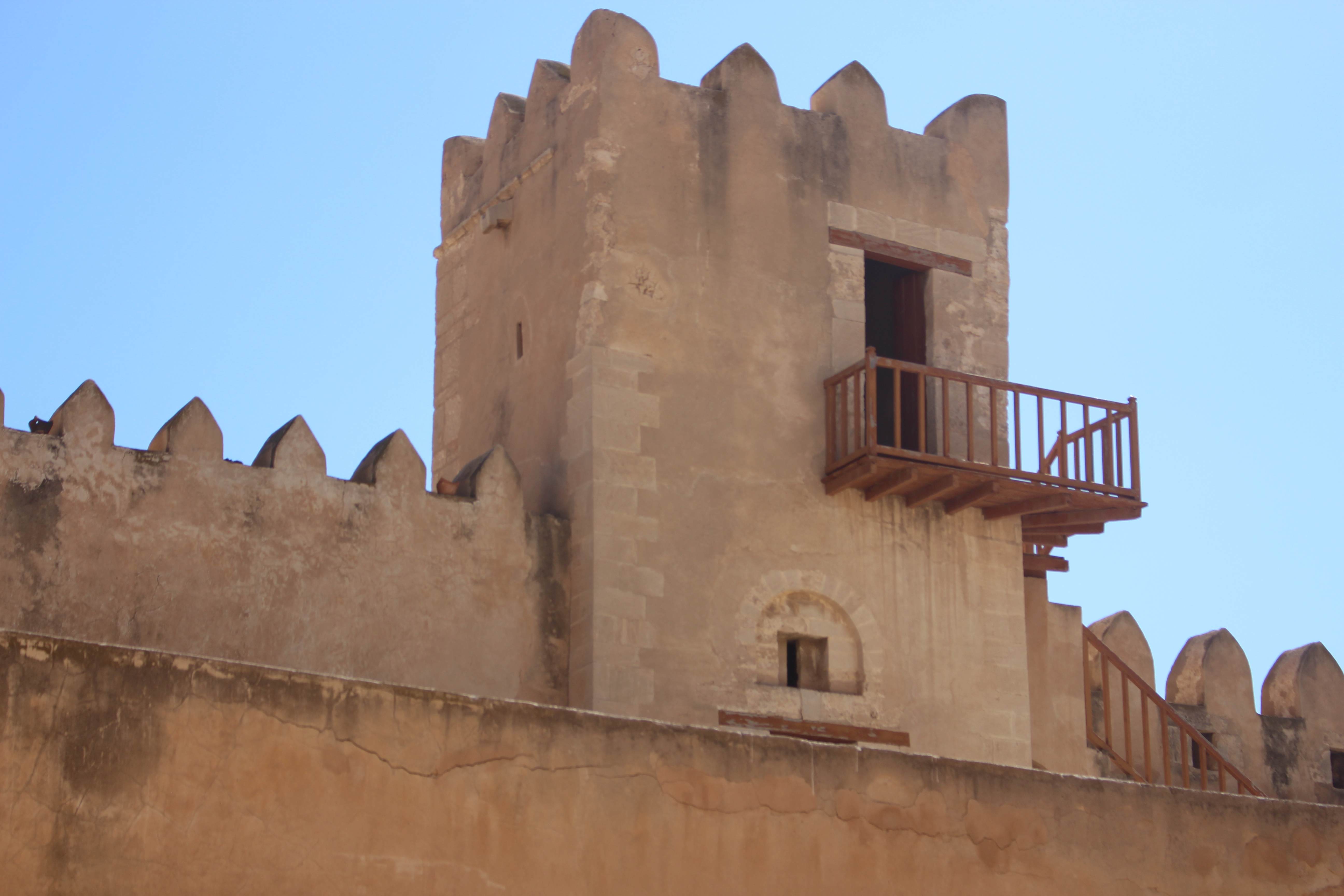 C'est une tour d'observation qui existe dans la Casbah de Sfax.